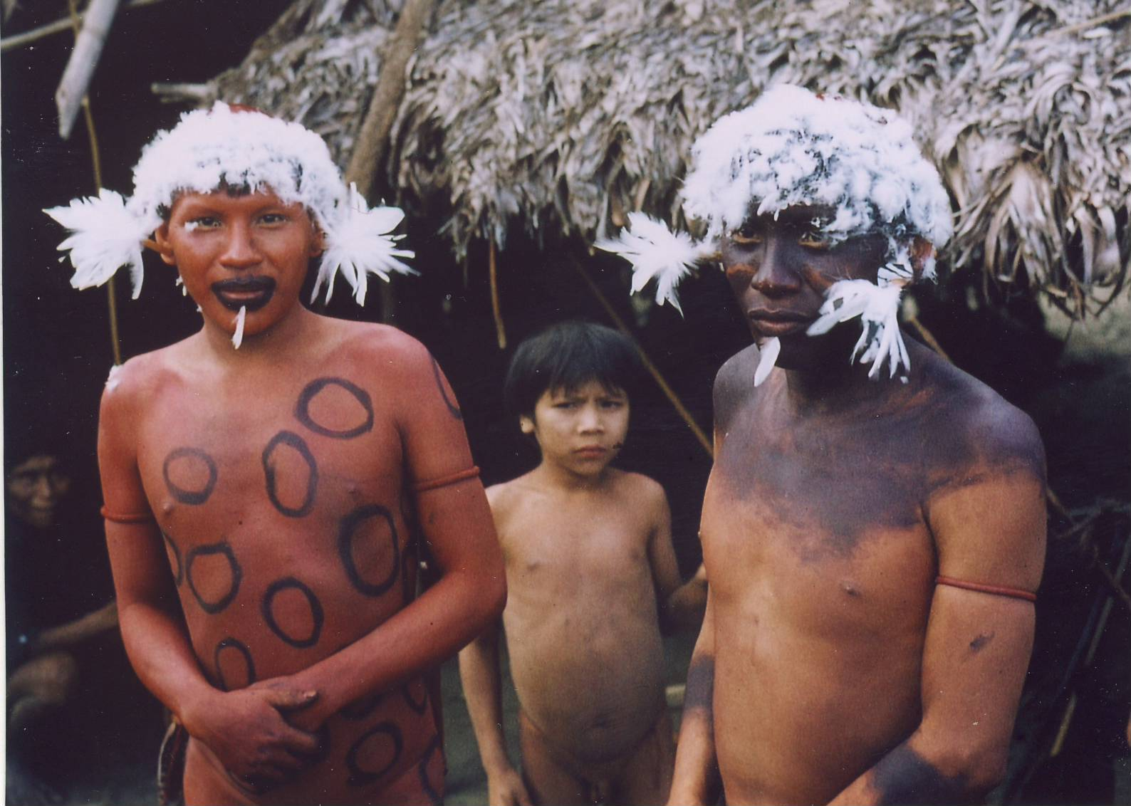 Festlich geschmückte Besucher aus einem Nachbarschabono